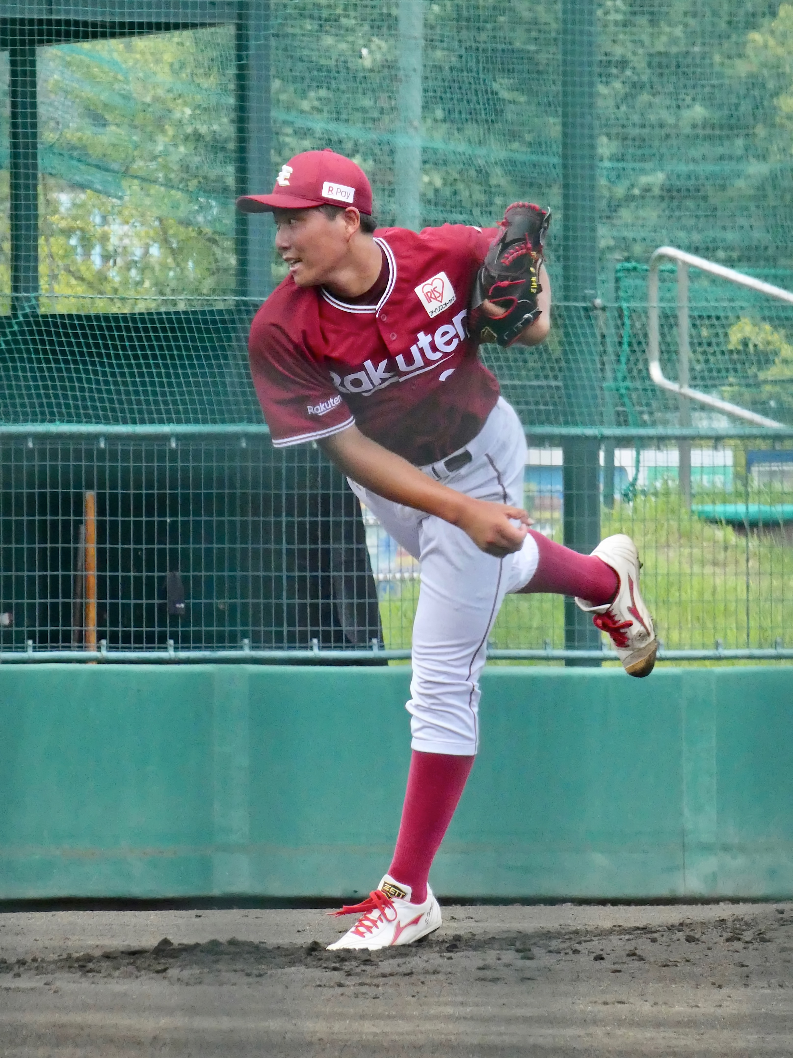 東北楽天ゴールデンイーグルスの選手「引地秀一郎」。ロッテ浦和球場にて。